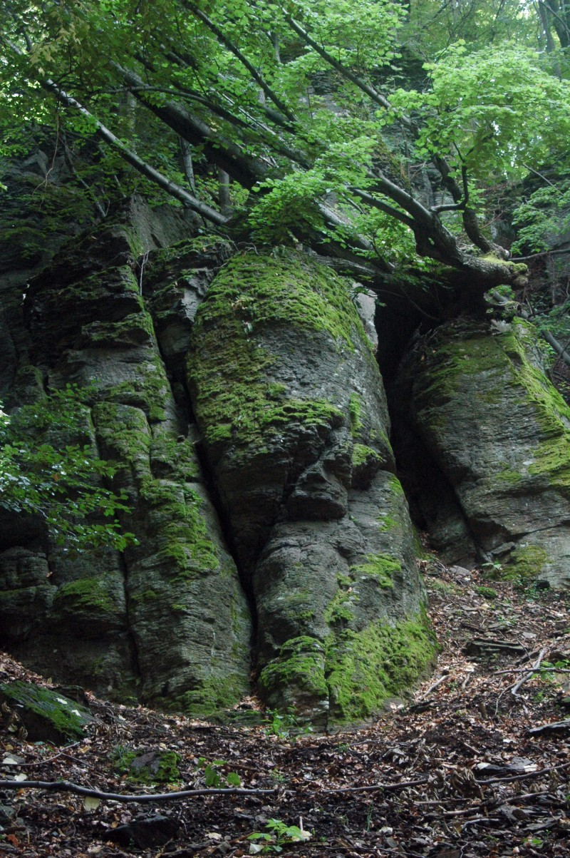 Rocks near Podhradie, Vtáčnik